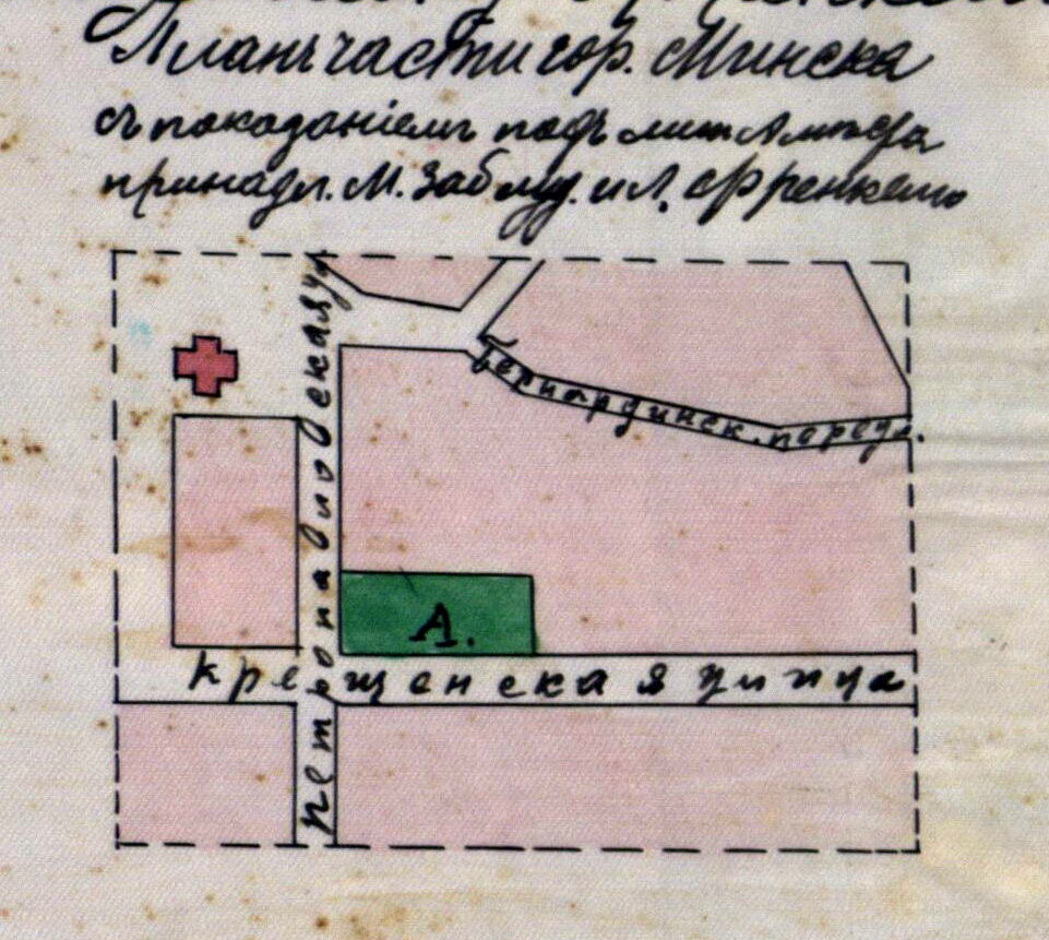 Беларуская (тарашкевіца): Менск (Miensk), вуліца Валоцкая (vulica Vałockaja). Камяніца Гейдукевічаў (Hiejdukievič)